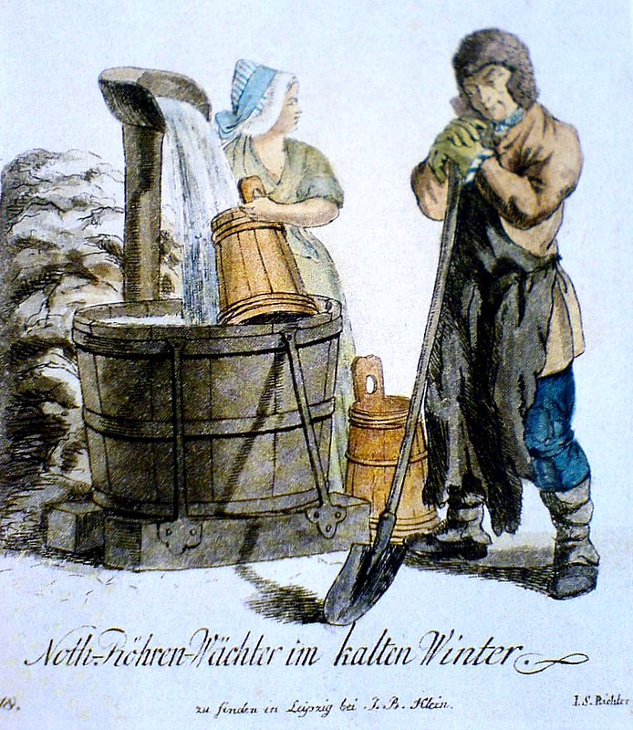 Noth-Röhren-Wächter im kalten Winter (kolorierter Kupferstich)